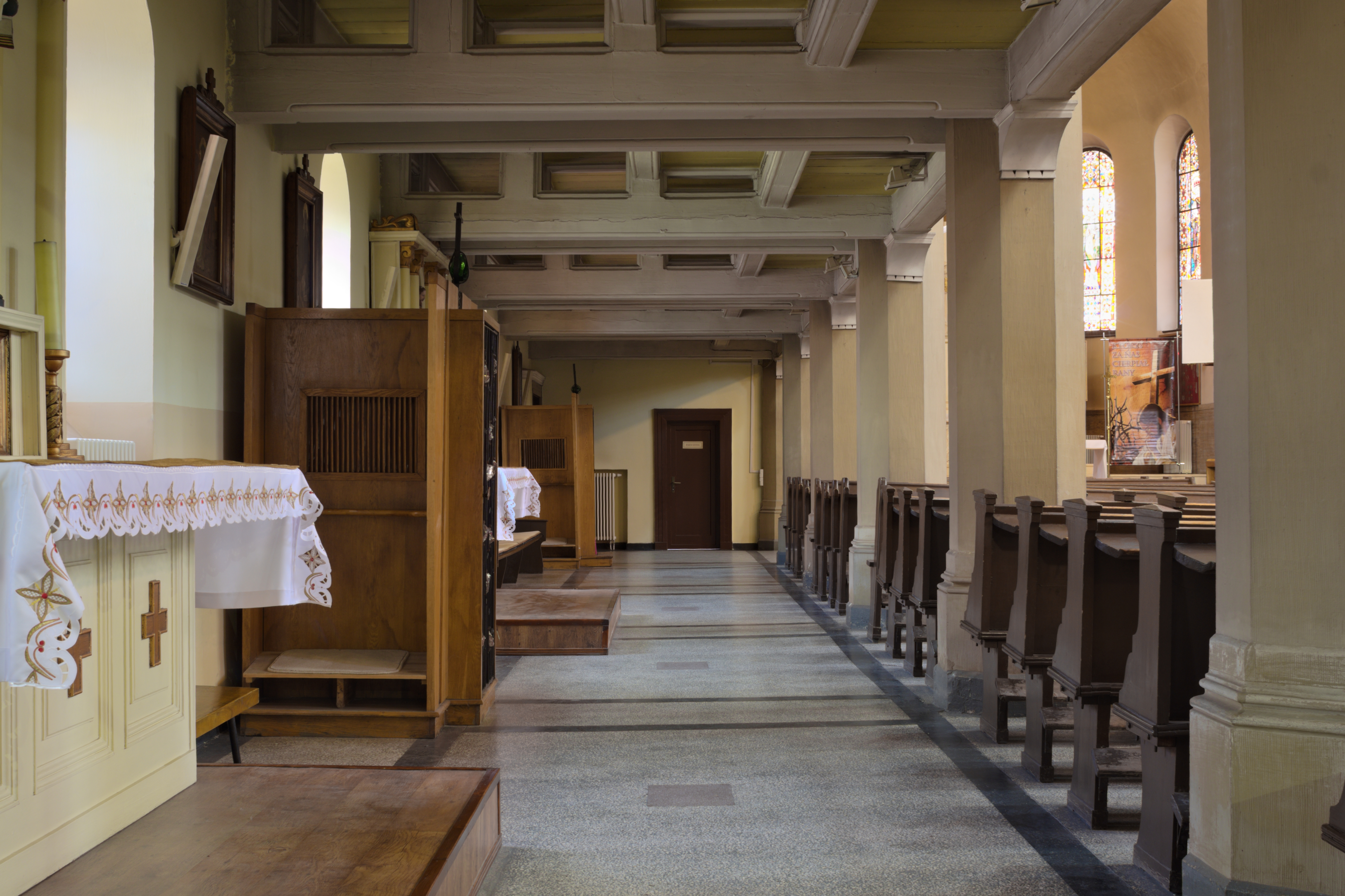 południowo-wschodnia nawa boczna kościoła św. Barbary w Gliwicach, z boku konfesjonały, na wprost wejście do zakrystii